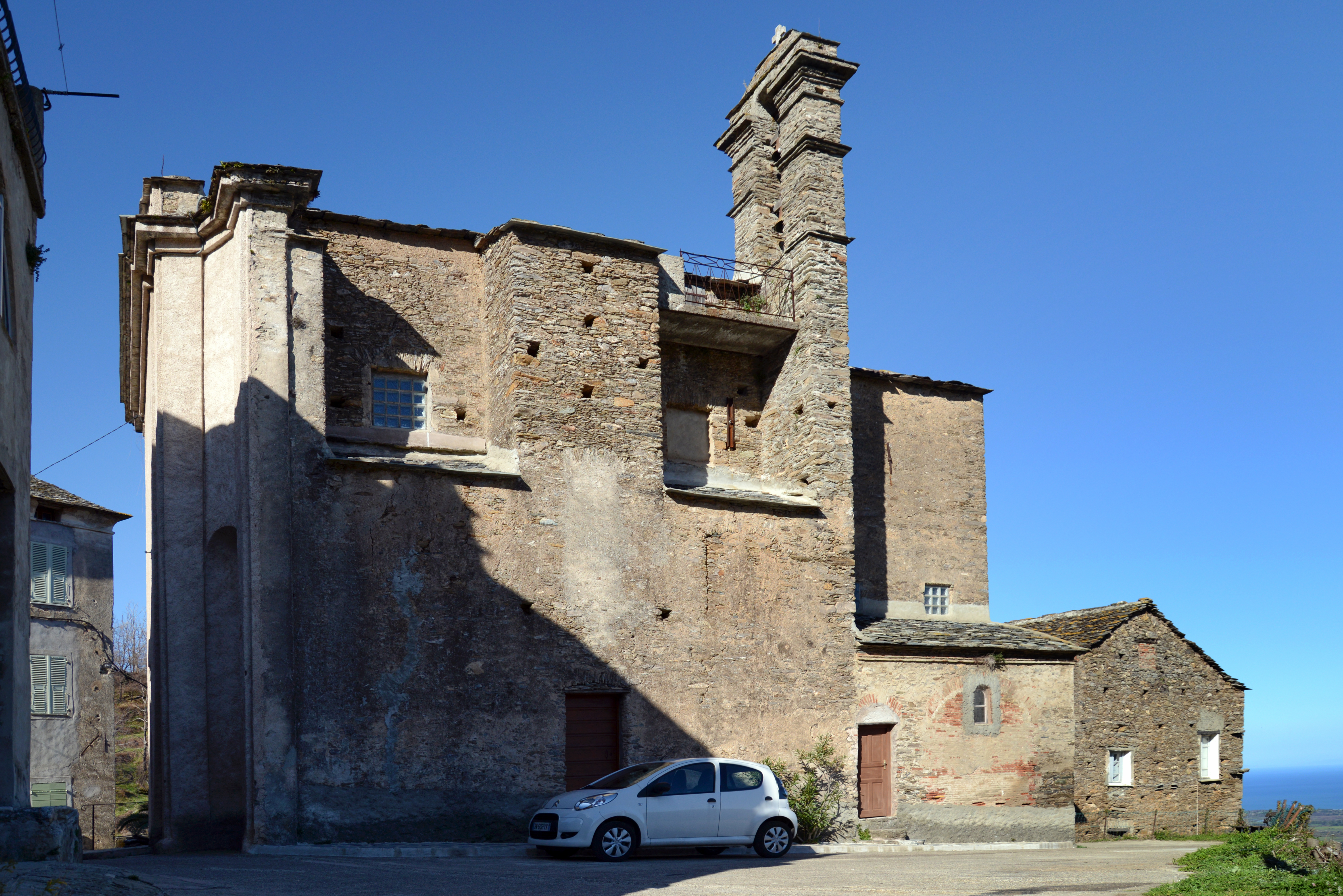 Sorbo-Ocagnano, Casinca (Haute-Corse) - Façade méridionale de l'église paroissiale de l'Annonciation du début XVIIIe siècle, placée sous le patronage de San Còsimu et San Damianu.